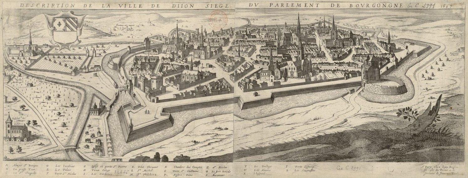 Description de la ville de Dijon siège du parlement de Bourgogne, 1647